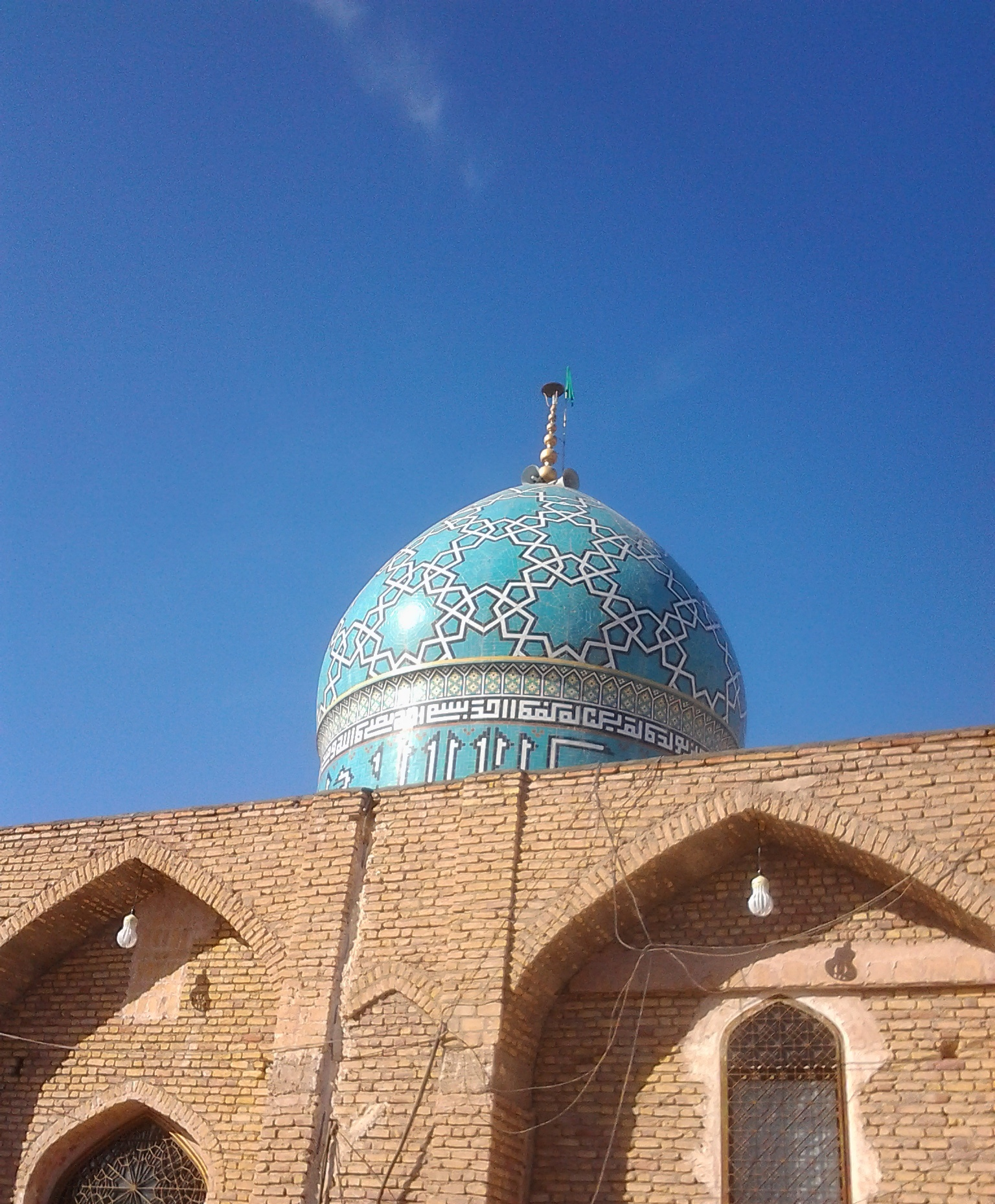 امام زاده محمد ابن زید شهداد در استان کرمان